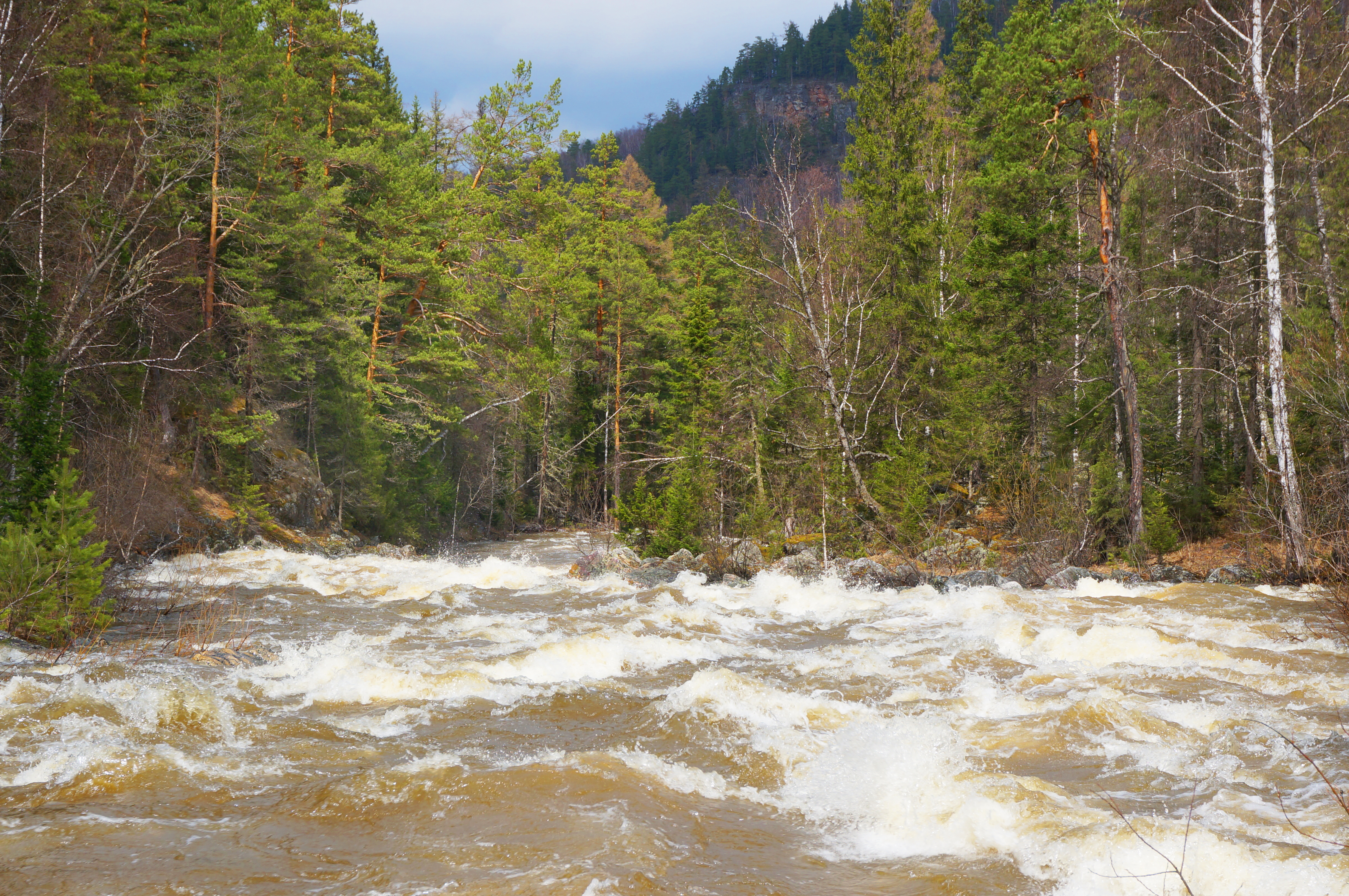 Река Березяк: Саткинский район, Челябинская область This image is related to the protected area of Russia number 7410259